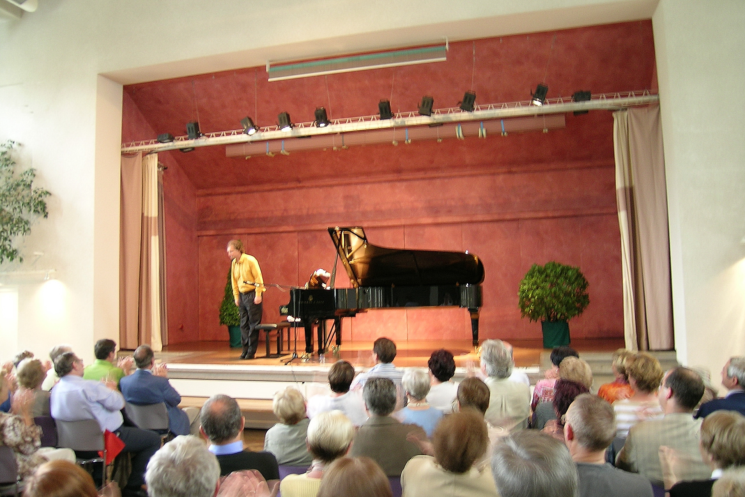 Einführungsvortrag Stefan Mickisch